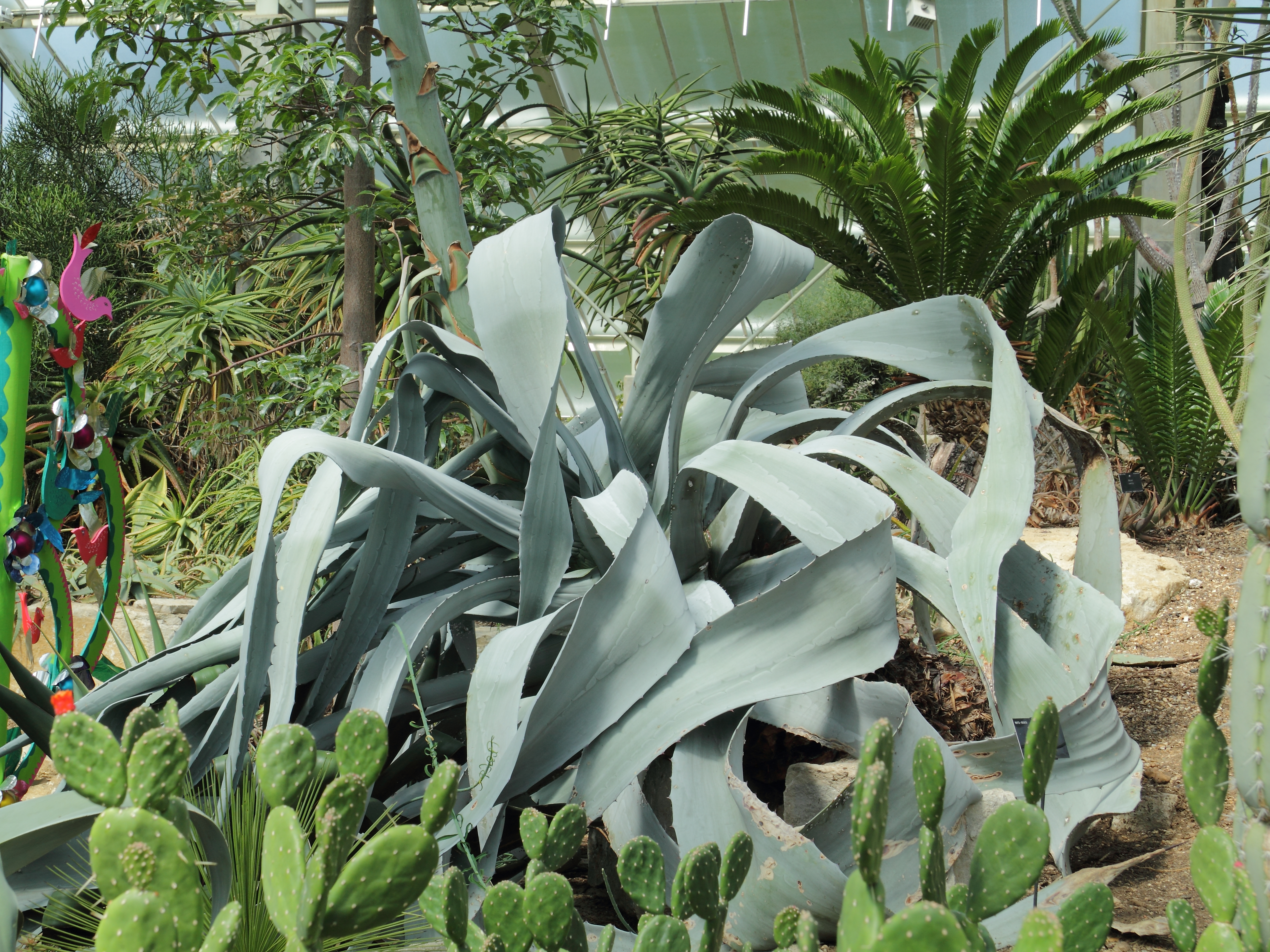 Agave franzosinii, identifierad med hjälp av befintlig skylt vid Kew Gardens, London.